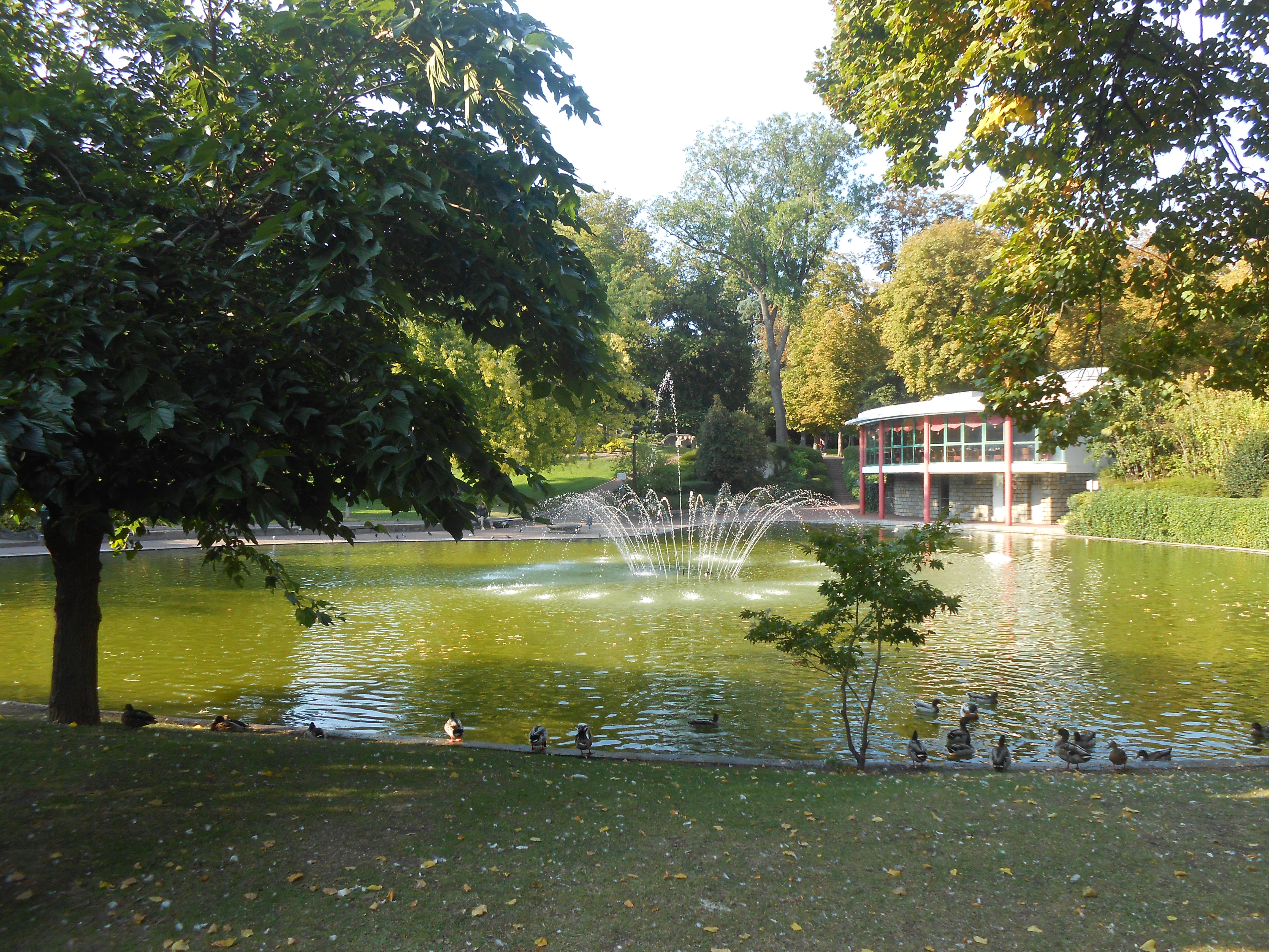 Bassin, Jardin Lecoq, Clermont-Ferrand, Auvergne.